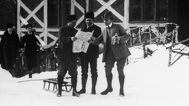 De Otte i Christiania